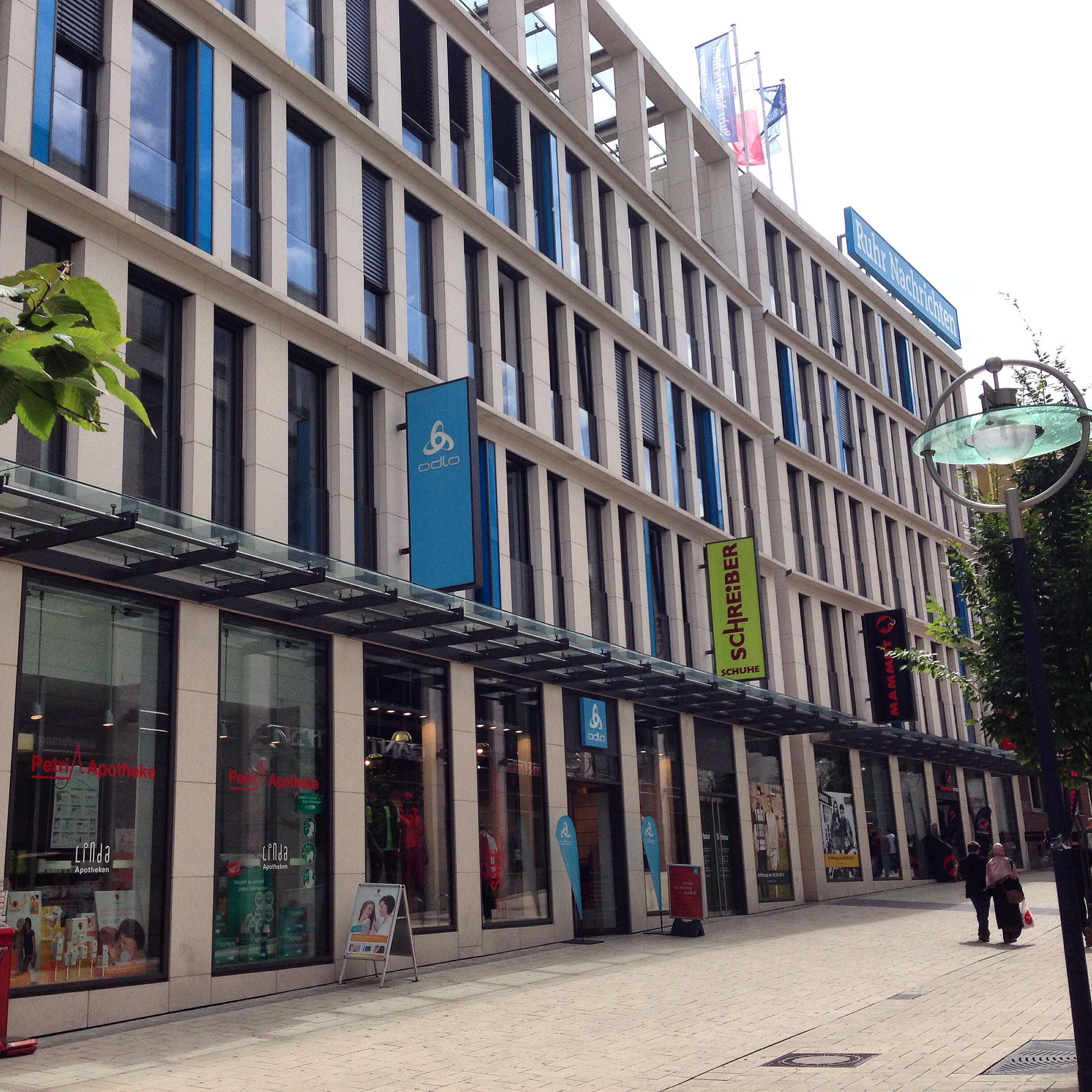 Lensing Carée als Hauptsitz der Ruhrnachrichten